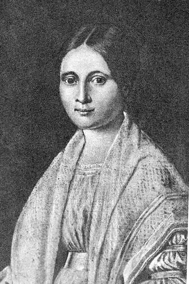 Sophie Koerner, nee Engelmann (1815-1888), spouse of Gustav Koerner